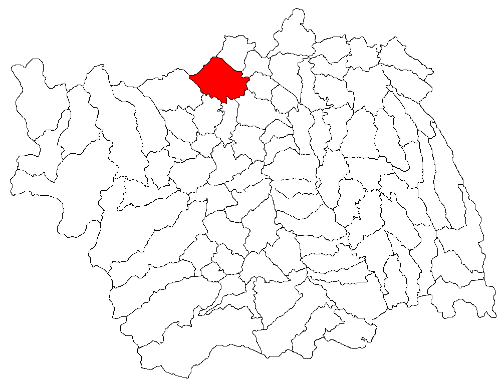 Categorie:Hărţi ale judeţului Bacău